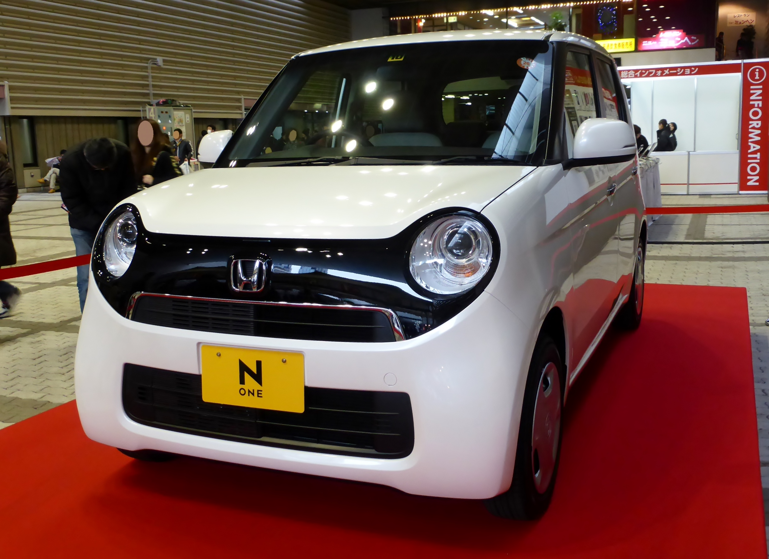 大阪オートメッセ2014においてJG1型ホンダ・N-ONE Gを撮影。